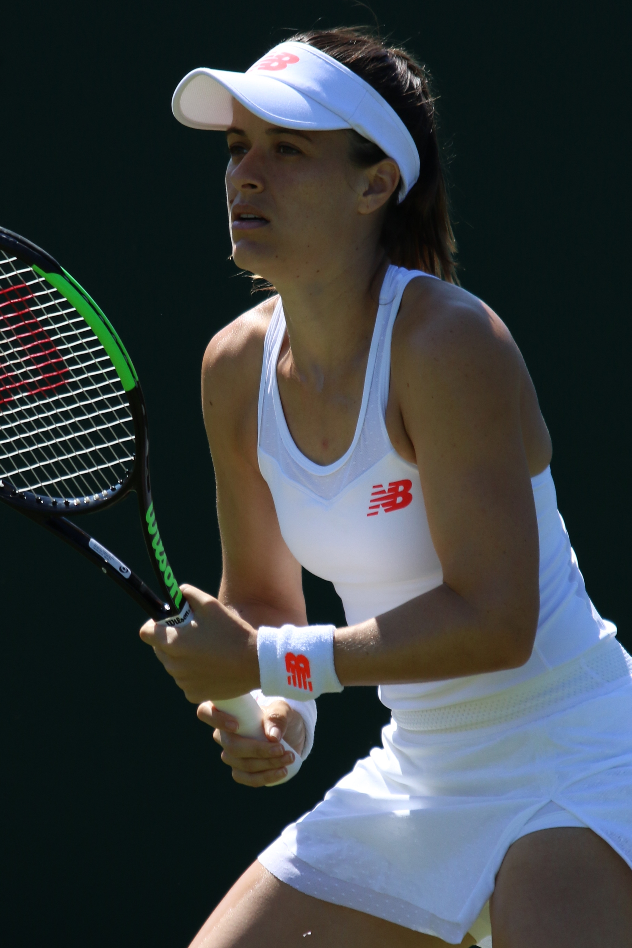 Gibbs WMQ18 (11)